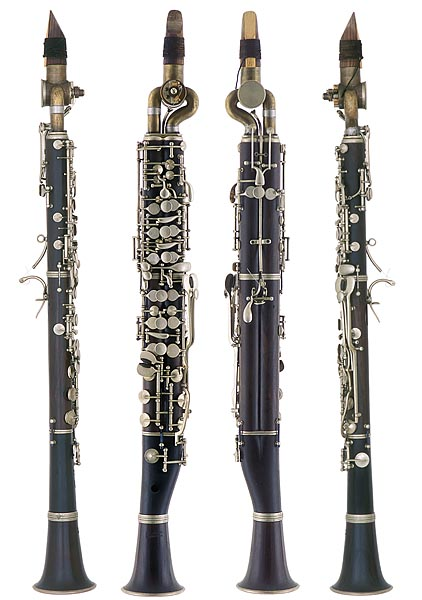 Vierteltondoppelklarinette von Fritz Schüller Markneukirchen.